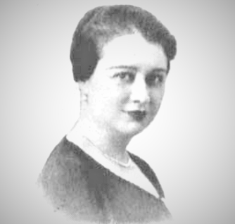 Amalia Bordiga